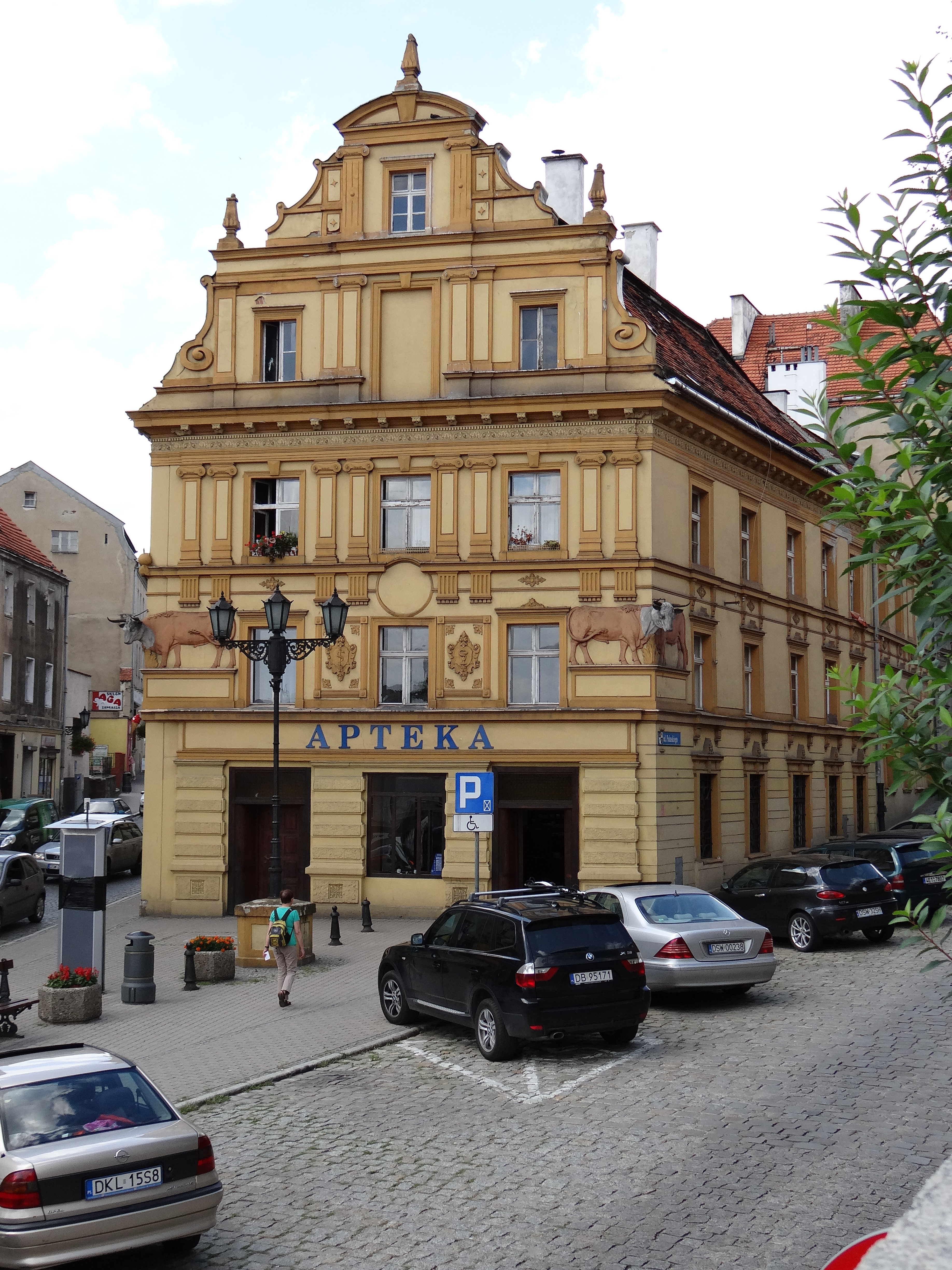 Świdnica, dom "Pod Bykami", XVI, XIX